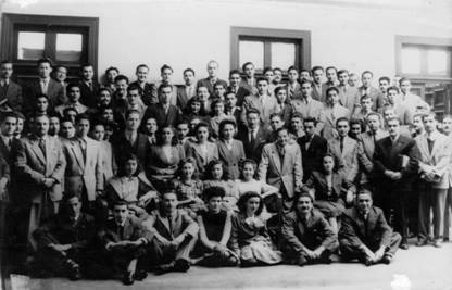 Curso Fiscal de Leyes impulsado por Eduardo de la Barra, rector del Liceo de Valparaíso (actual Liceo Eduardo de la Barra). Liceo de Valparaíso, 1911. A partir de este curso se formaría la primera Escuela de Derecho regional de Chile.